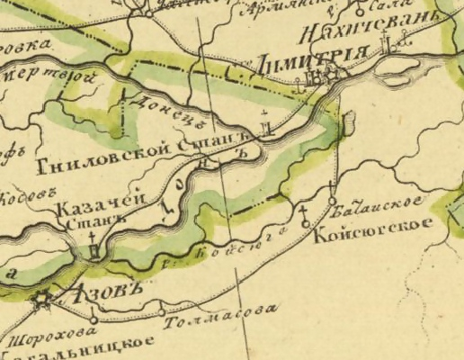 Азов, Ростов-на-Дону (на карте — С. Димитрия, то есть Святого Димитрия), Нахичевань-на-Дону (Нахичевань) и их окрестности на «Подробной карте Российской империи и близлежащих заграничных владений» (неофициально — Столистовая карта) издания 1816 г. Условные обозначения см. на листе File:Подробная карта Российской империи и близлежащих заграничных владений — лист A (титул и условные обозначения).jpg С. Димитрия (будущий Ростов-на-Дону) обозначен как крепость и как уездной город, Азов — как крепость, Нахичевань (сейчас является частью Ростова-на-Дону) — как приписной город. Прямыми буквами (не курсивом) обозначены посёлки с населением более 500 жителей.